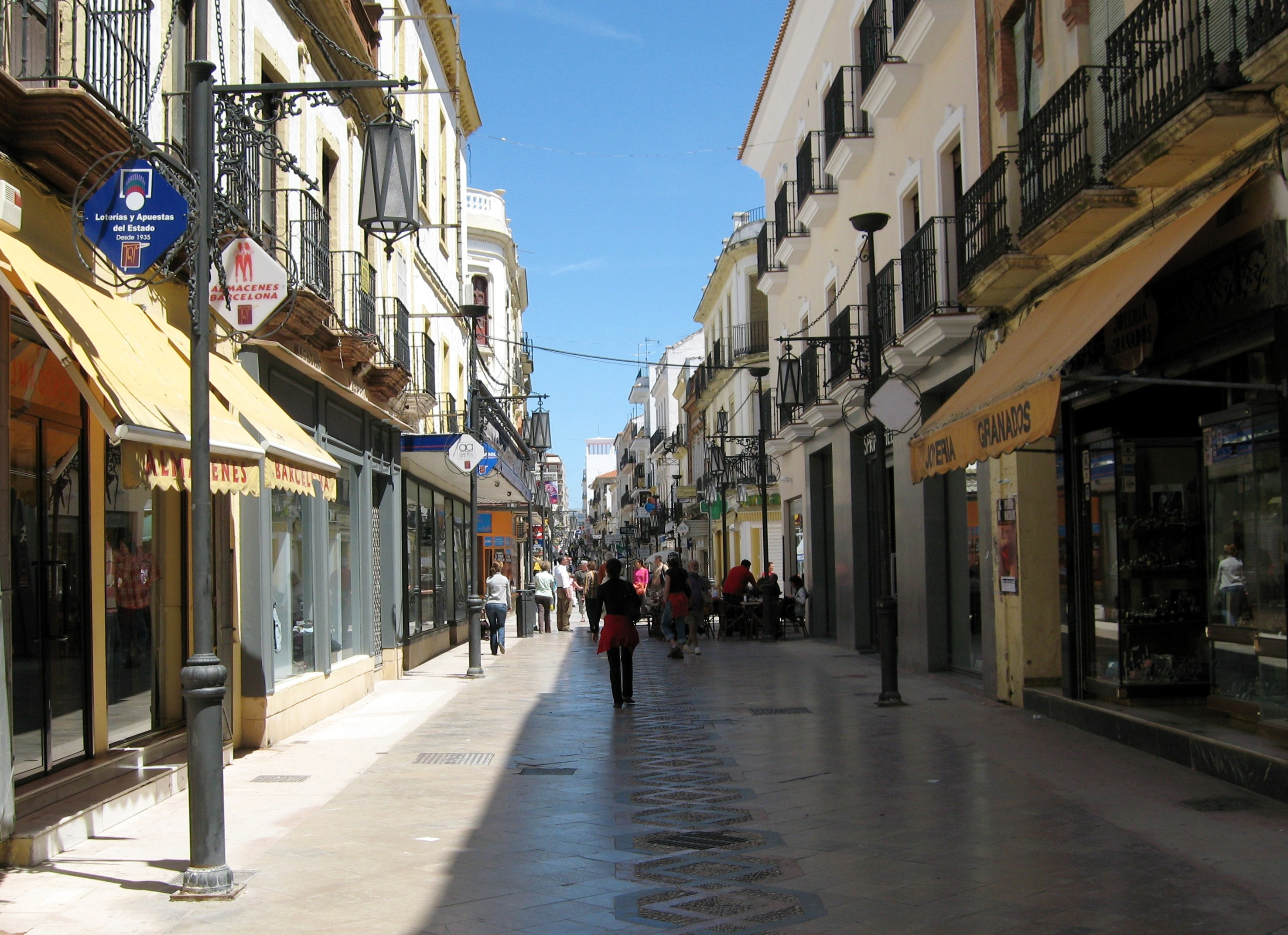 Fußgängerzone der Straße Carrera Espinel in Ronda, Provinz Málaga, Andalusien, Spanien